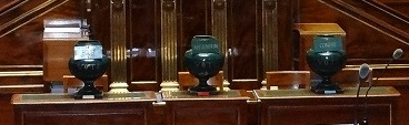 Les urnes servant aux scrutins publics au Sénat Urne "pour" avec un bulletin blanc. Une "contre" avec un bulletin bleu. Urne "abstention" avec un bulletin rouge.